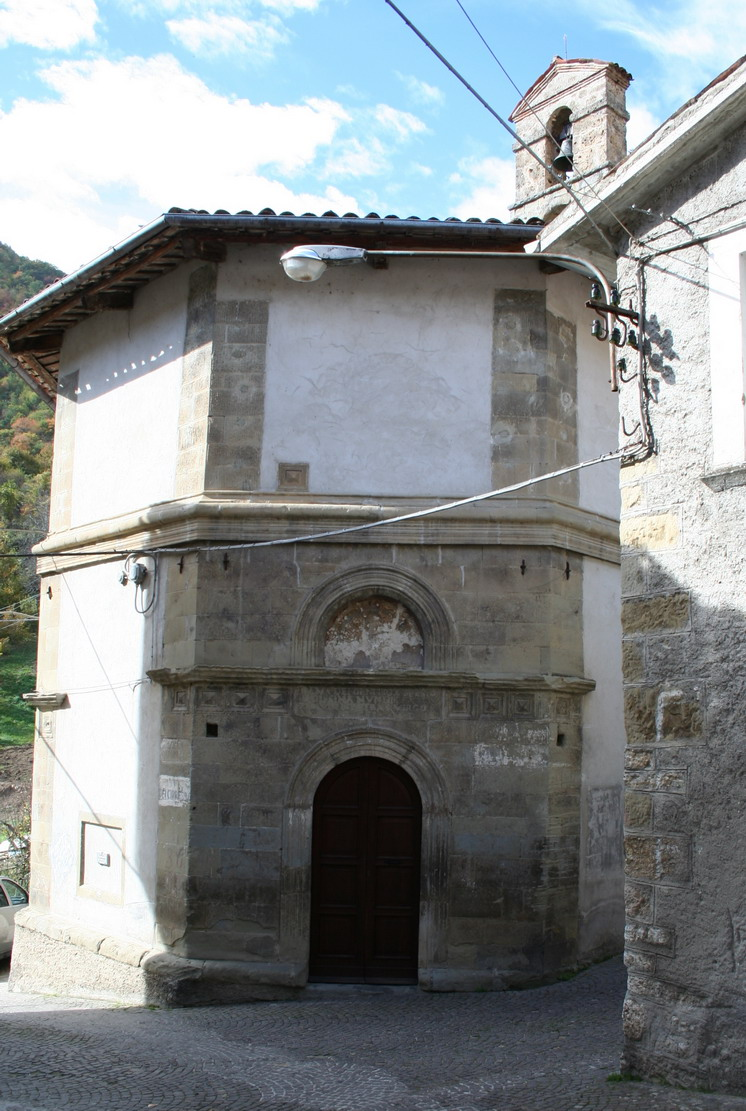 Immagine diurna del Tempietto di Capodacqua.